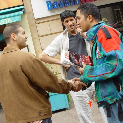 Jesus Army evangelism